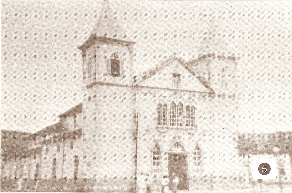 Antiga Igreja Matriz de Viçosa Inaugurada em 1935